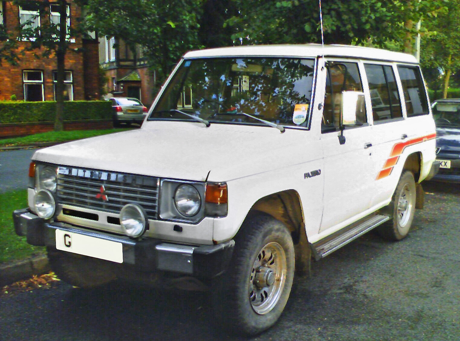 (NOT: Mitshubishi-name of file) GOD: Mitsubishi Pajero mk I.